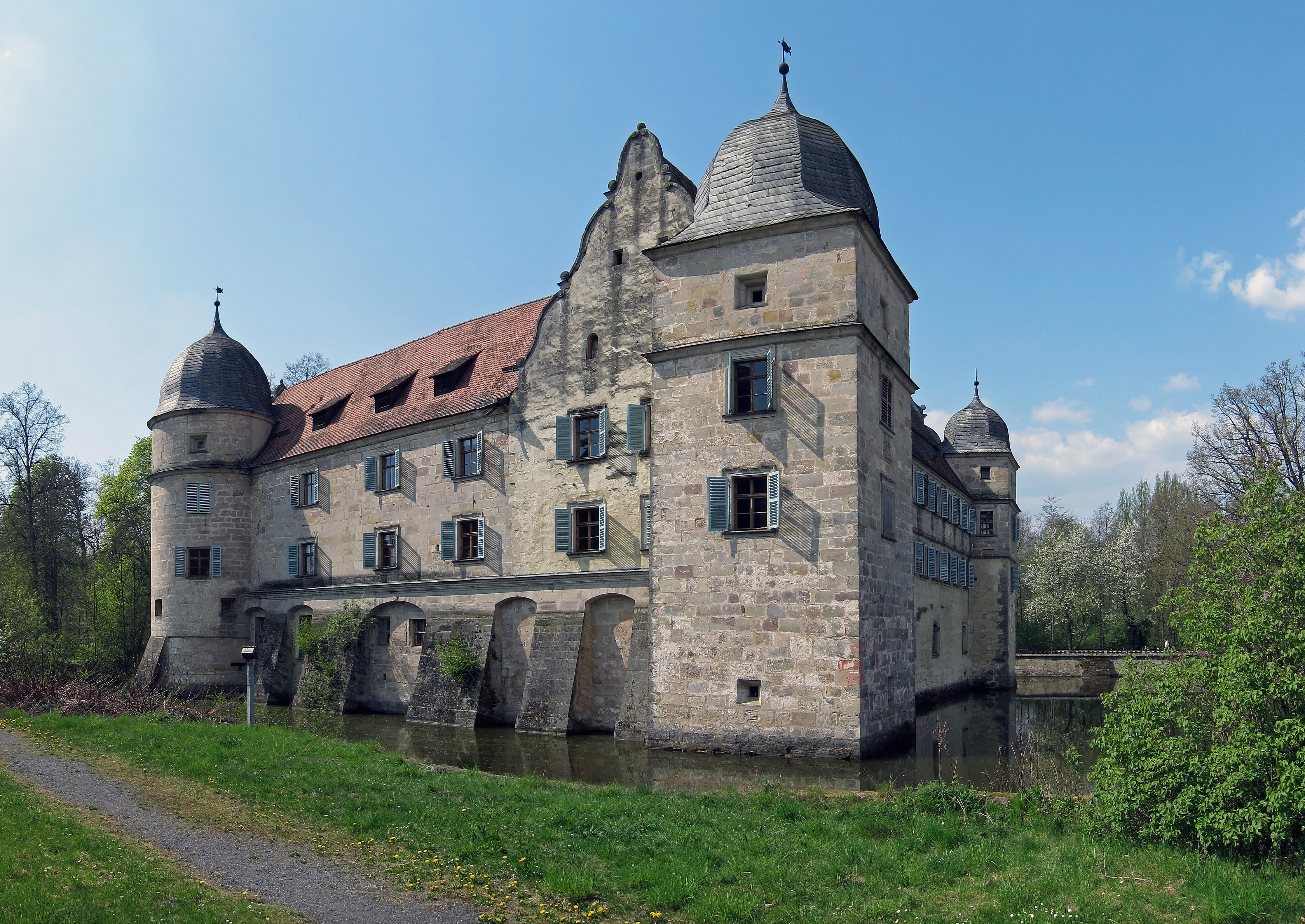 Das Wasserschloss Mitwitz steht in der Gemeinde Mitwitz zwischen Coburg und Kronach in Oberfranken. Das erstmals im Jahre 1266 urkundlich erwähnte Schloss wurde in den Jahren 1977 bis 1989 vom Landkreis Kronach saniert. Der dreigeschossige Vierflügelbau mit Satteldächern und vier Ecktürmen ist von einem Wassergraben umgeben.